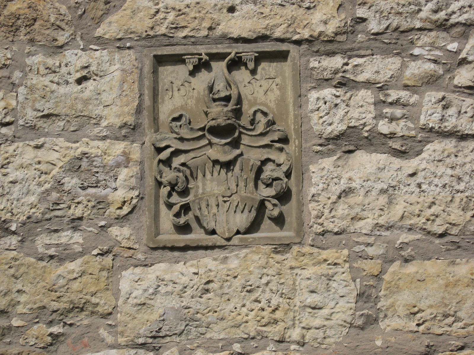 Obersontheim, Herrenmühle, limpurgisches Wappen von 1557 an der Straßenseite